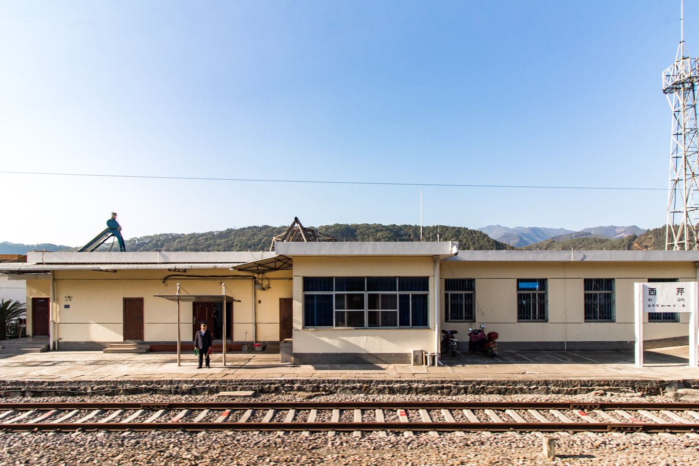 中文（中国大陆）: 外南铁路西芹站